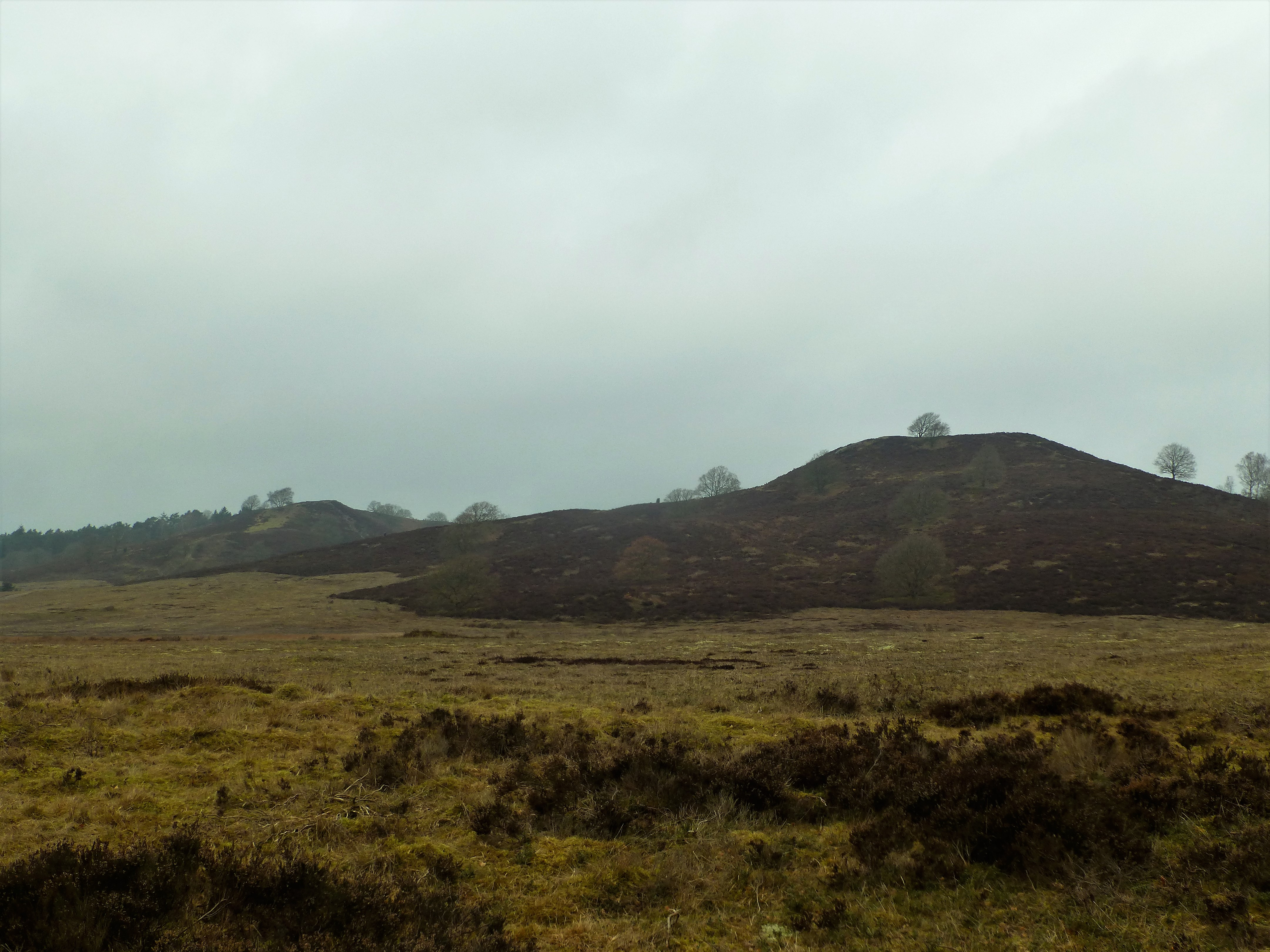 Sindbjerg og Stovbjerg på Sejs Hede ved Silkeborg